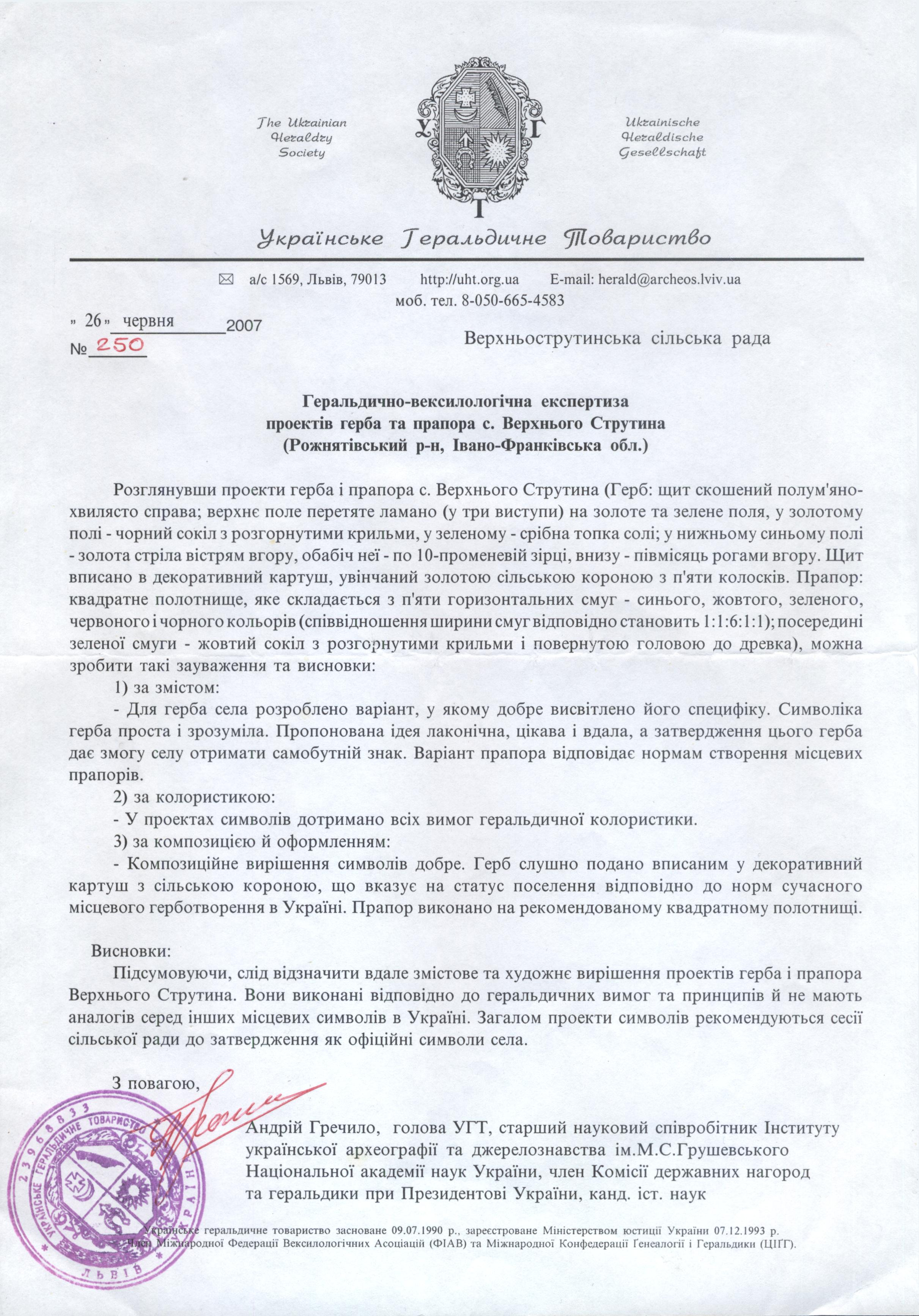 Підтвердження гербу і прапора